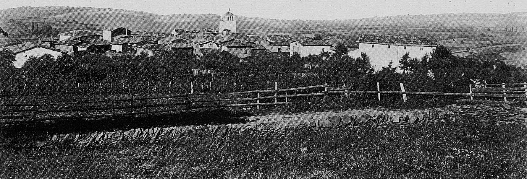 Dictionnaire illustré des communes du département du Rhône. Tome 1 / par MM. E. de Rolland et D. Clouzet.